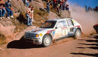 Carlos Reutemann sobre un Peugeot 205 Turbo 16 en el Rally de Argentina de 1985.